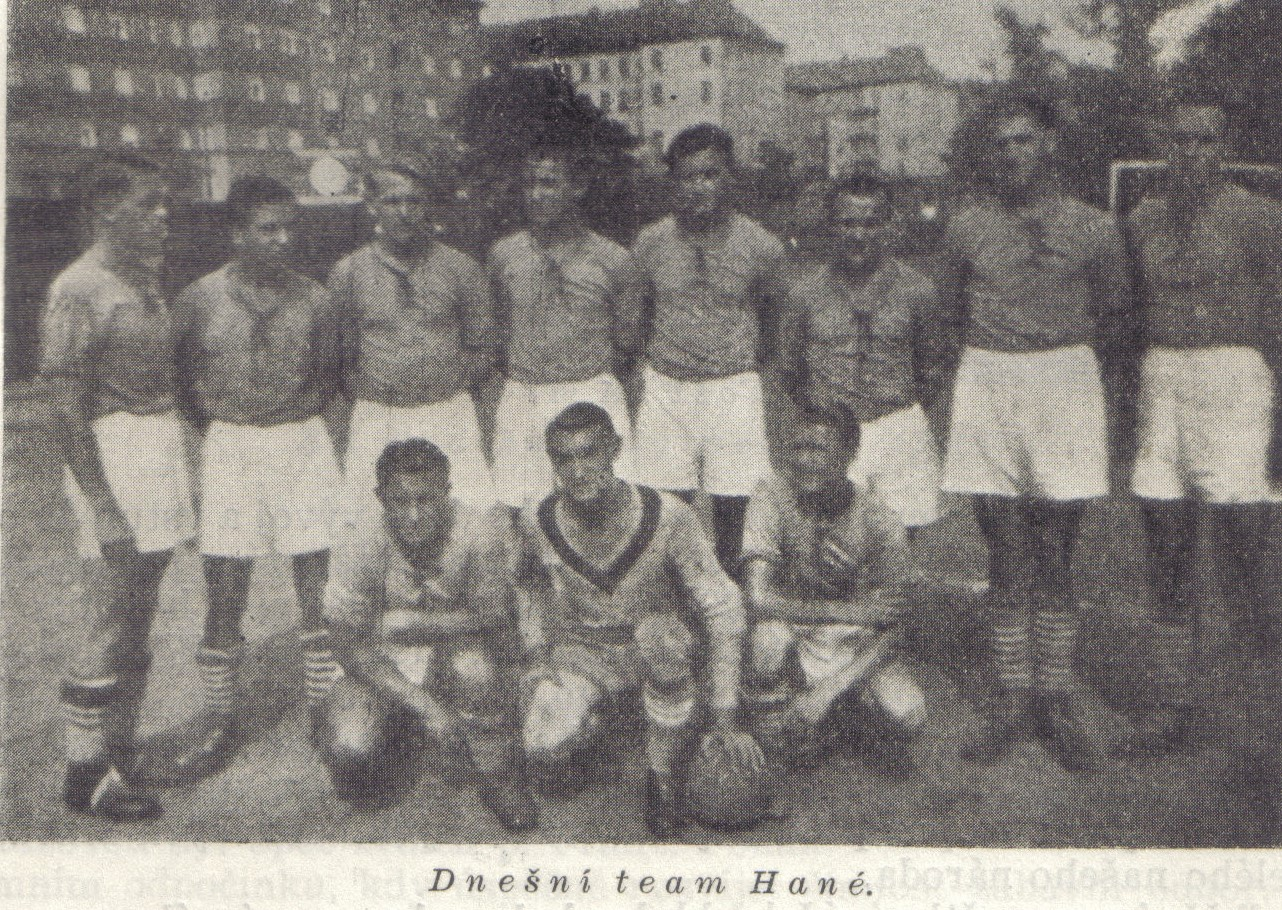 Tým na konci 30 let 20. století